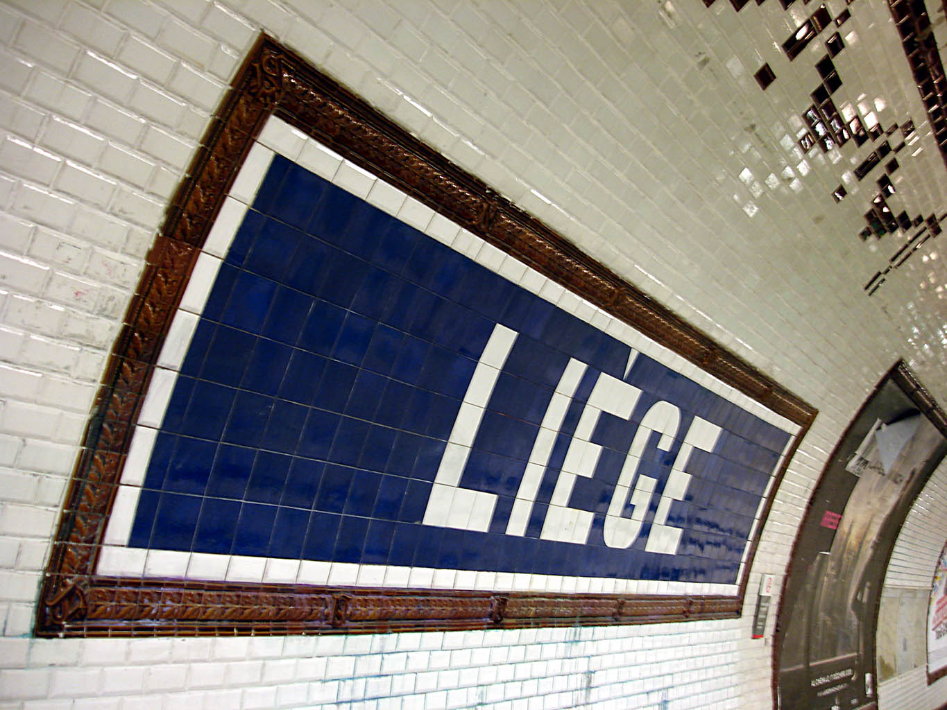 Station Liège, de la ligne 13 du métro de Paris, France.